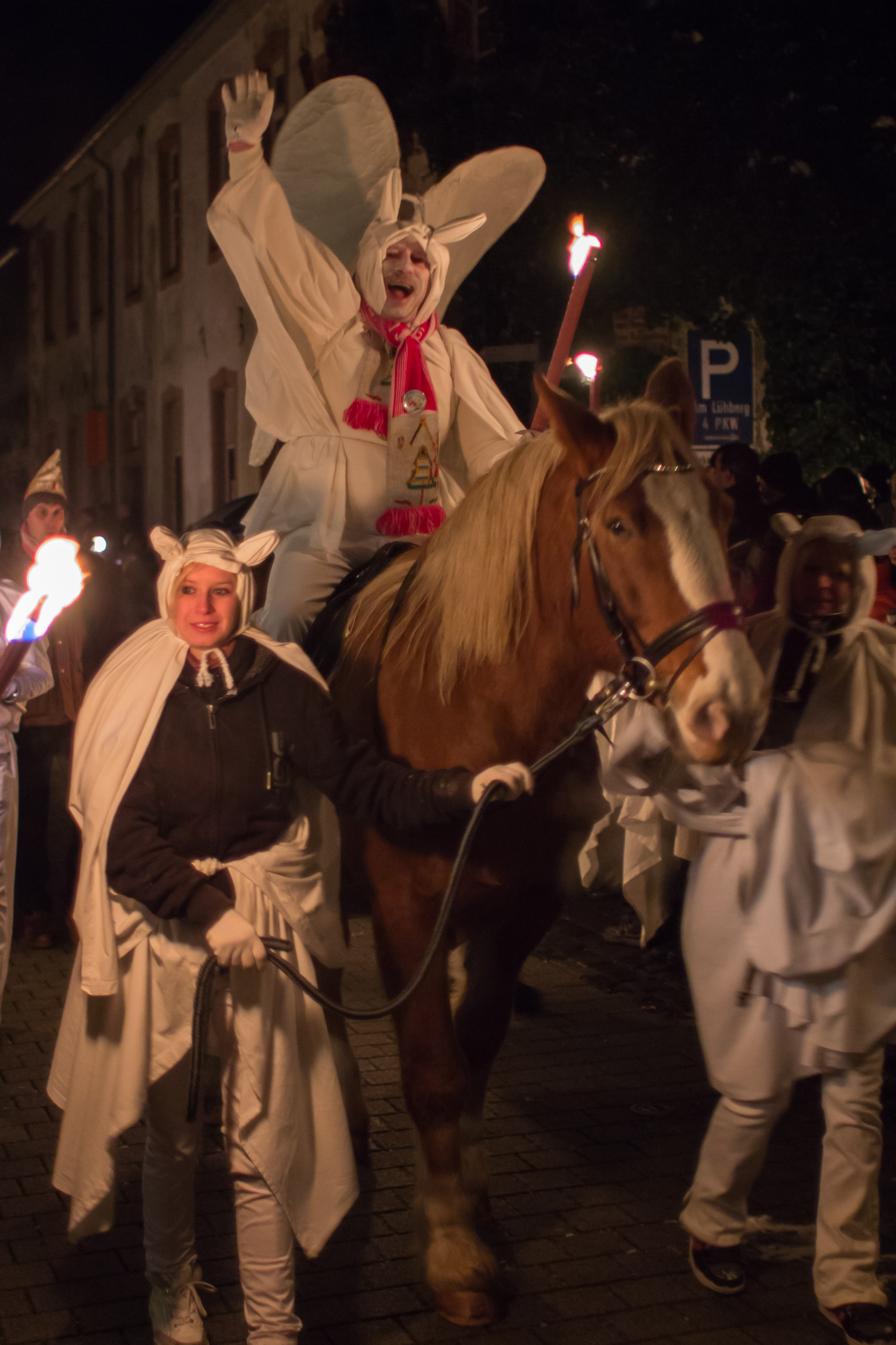 Blankenheimer Geisterzug 2012